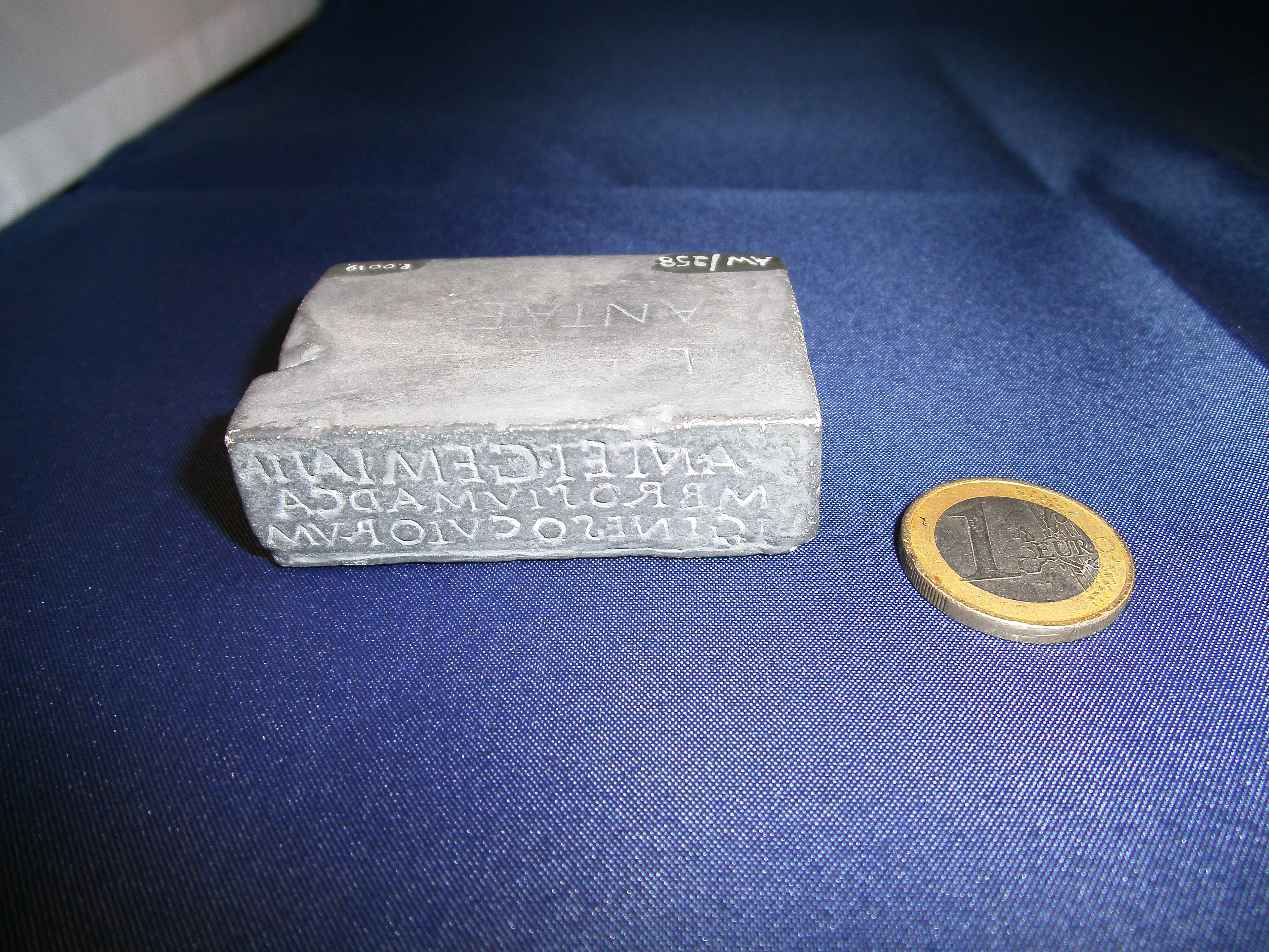 Romeinse oculistenstempel (oogartsenstempel) gevonden te Elewijt